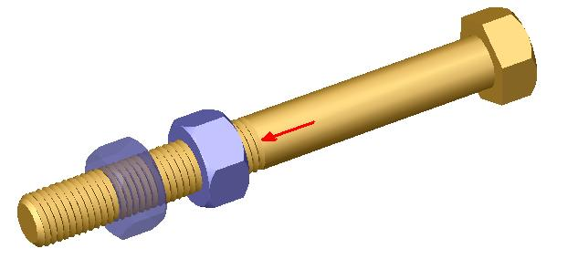 Image réalisée à l'aide de SolidWorks. Cours de mécanique.